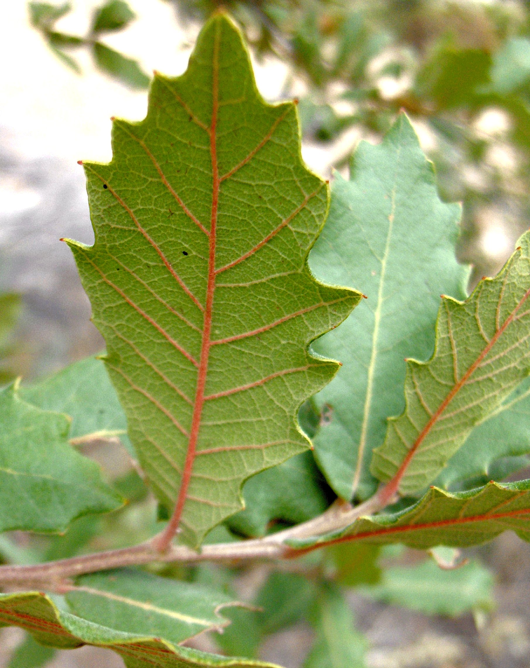 Quercus turbinella leaves, underside. Arizona.